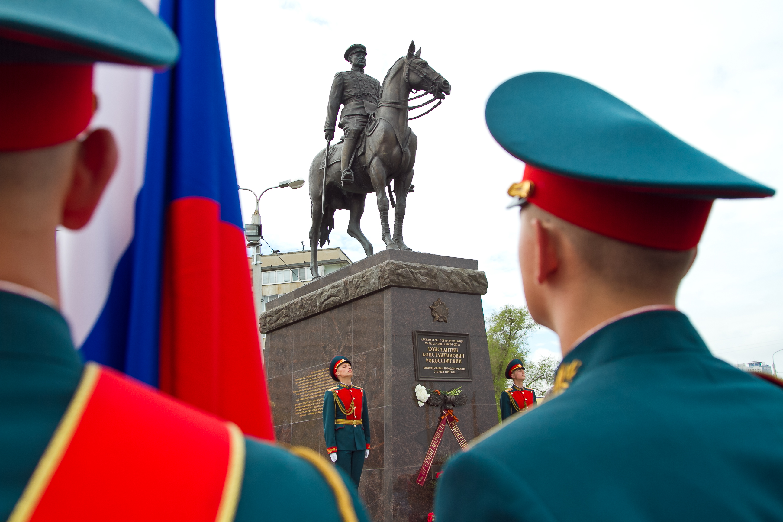 Открытие памятника Константину Рокоссовскому в Волгограде